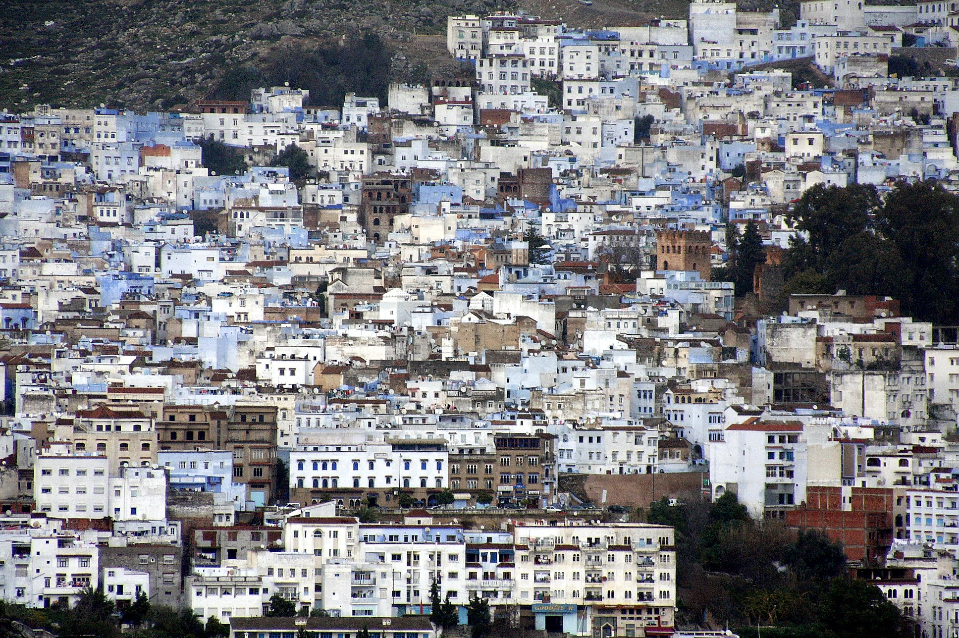 Chefchaouen vu de la route d'Ouezzane